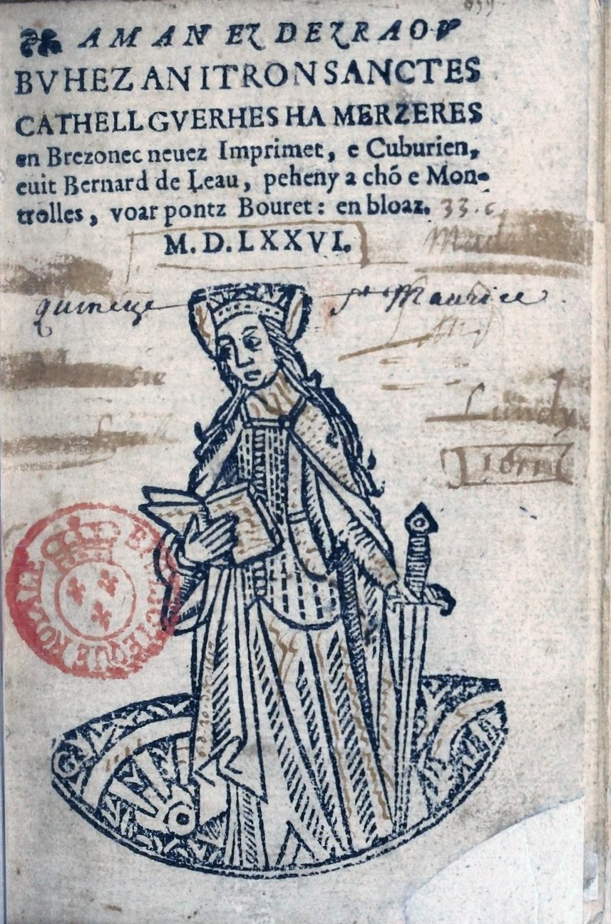 Livre en breton de Bernard de Leau, imprimé au monastère de Saint-François de Cuburien en 1576. Sainte-Catherine-d'Alexandrie.